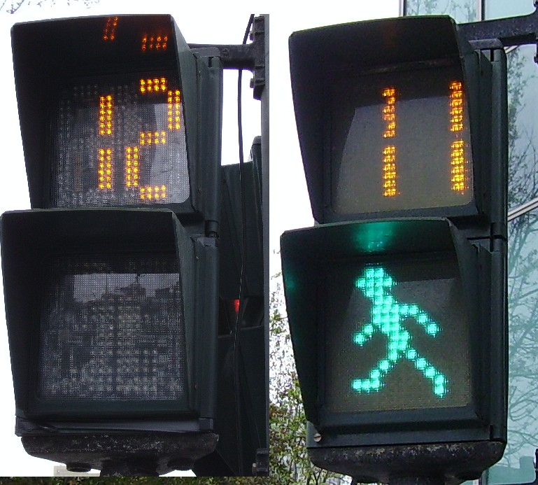 PHOTO BY WINERTAI